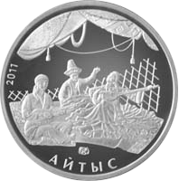 Монета Казахстана Айтыс